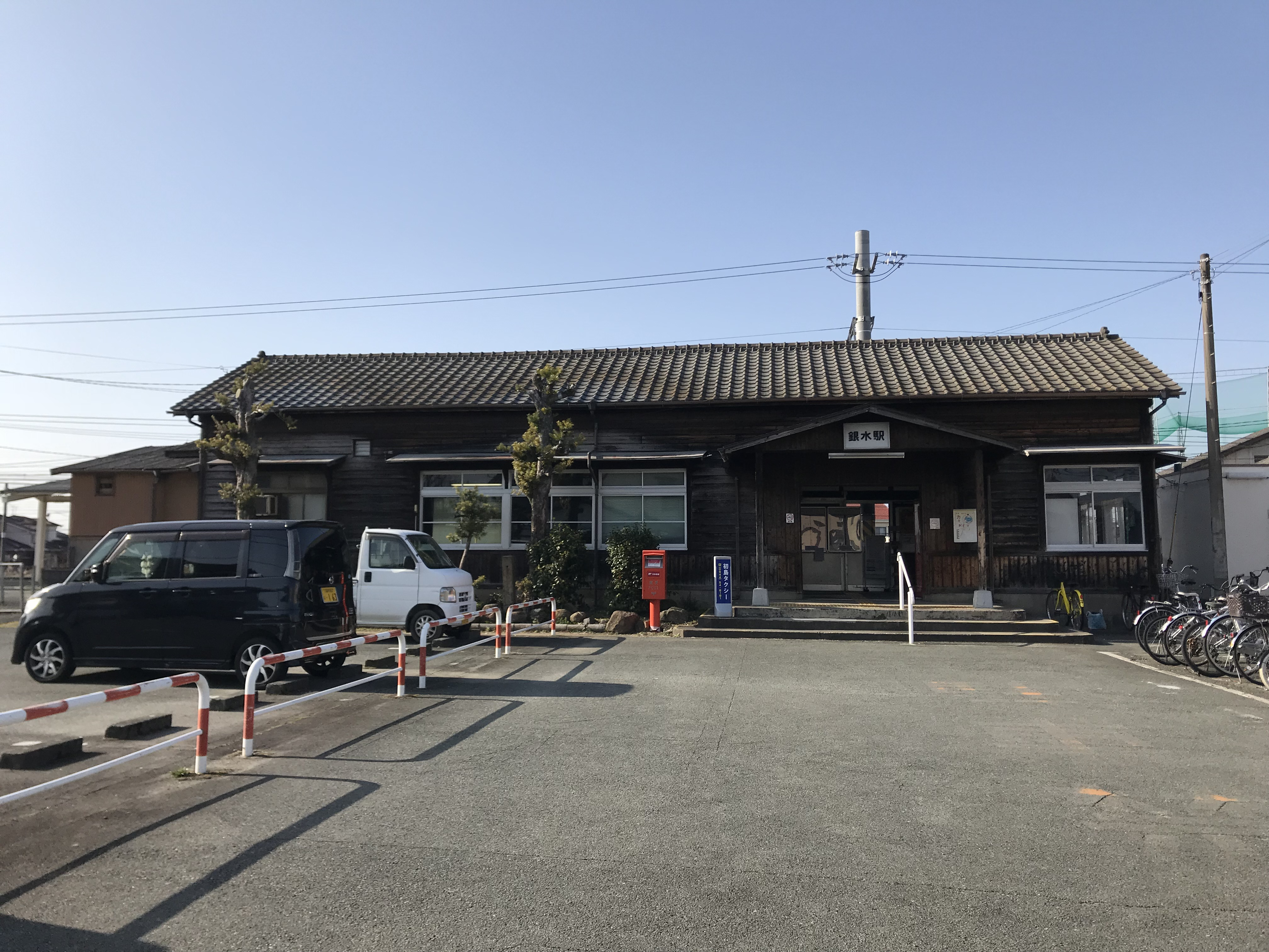 銀水駅の駅舎